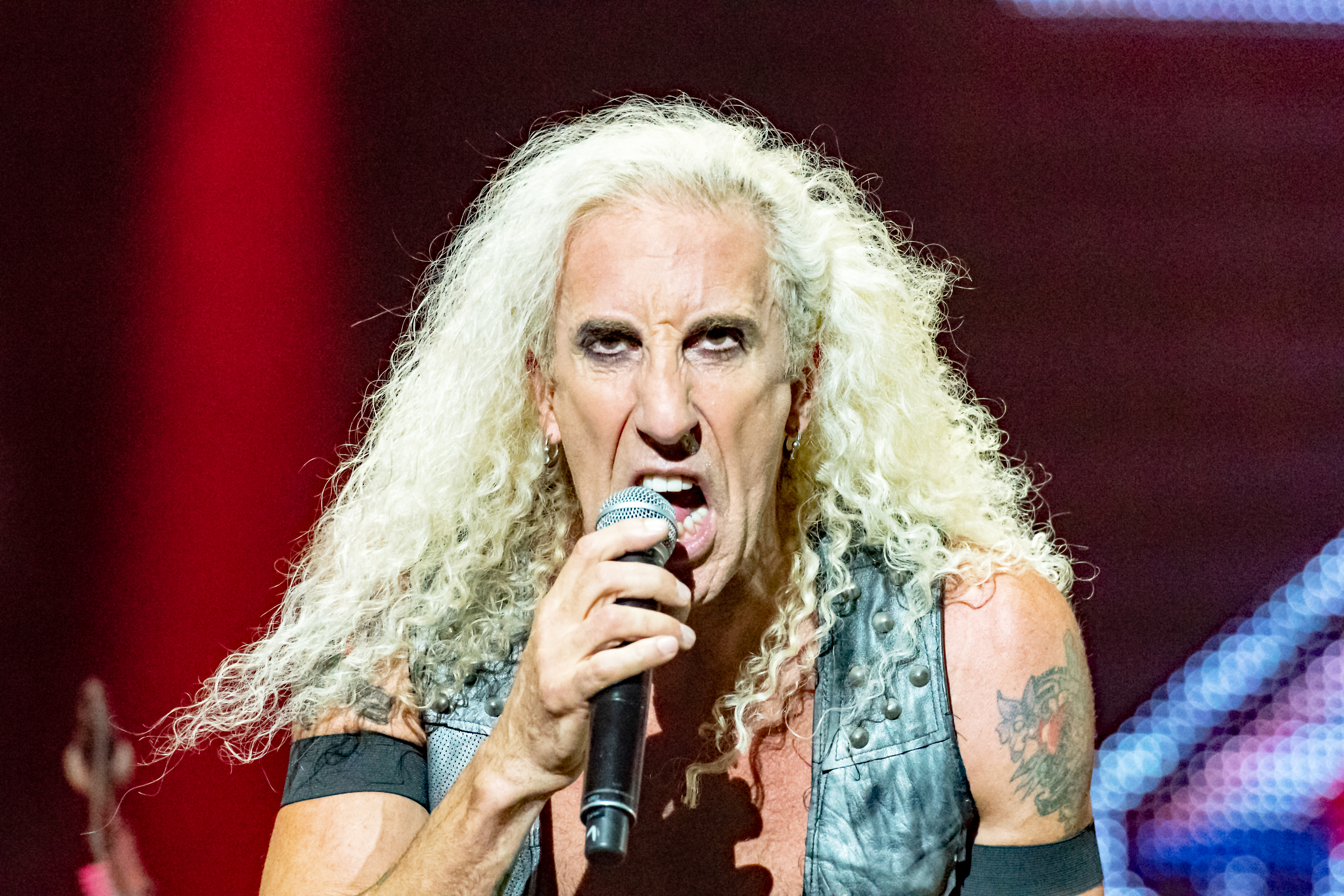 Twisted Sister beim Wacken Open Air 2016